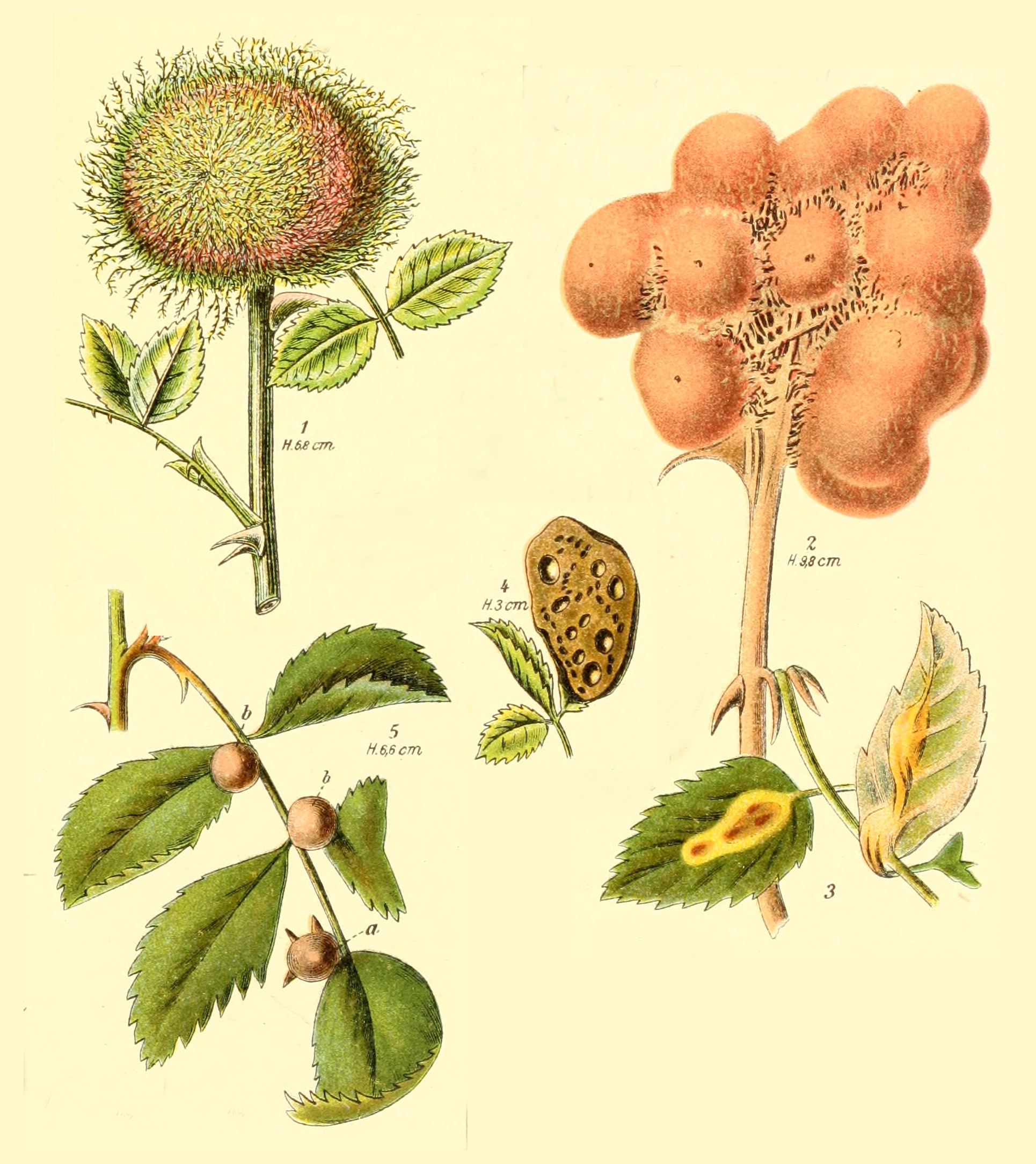 Gallen von: 1. Diplolepis rosae 2. Diplolepis mayri, 3. Diplolepis spinosissimae, 4. Diplolepis spinosissimae (Durchschnitt), 5a. Diplolepis nervosa, 5b. Diplolepis eglanteriae